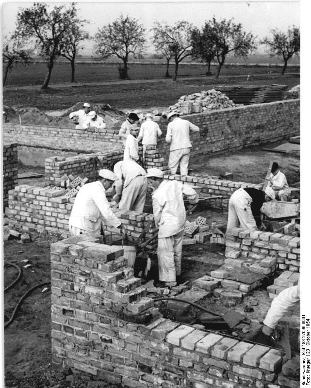 Alt-Tucheband, LPG, Bau eines Stalls Zentralbild Krueger Wjt-Qu-4 Mot.-23.10.1954 Die Lehrlinge des Lehrkombinates "Friedrich Ebert" in Berlin-Friedrichsfelde waren in Alt-Tucheband zum Ernteeinsatz. Dort erfuhren sie von den Sorgen der LPG-Bauern um den Bau eines Schweinestalles. Über die Betriebsleitung, die Betriebsparteiorganisation und BGL setzten sie durch, in Alt-Tucheband den Bau eines 85 Meter langen Schweinestalles auszuführen. Die 63 am Bau beteiligten Lehrlinge des Lehrkombinates übertreffen ihre Norm um 100 %. UBz: Die Lehrlinge des Lehrkombinates "Friedrich Ebert" beim Bau des Schweinestalles der LPG "Befreite Erde" in Alt-Tucheband, Bezirk Frankfurt-Oder